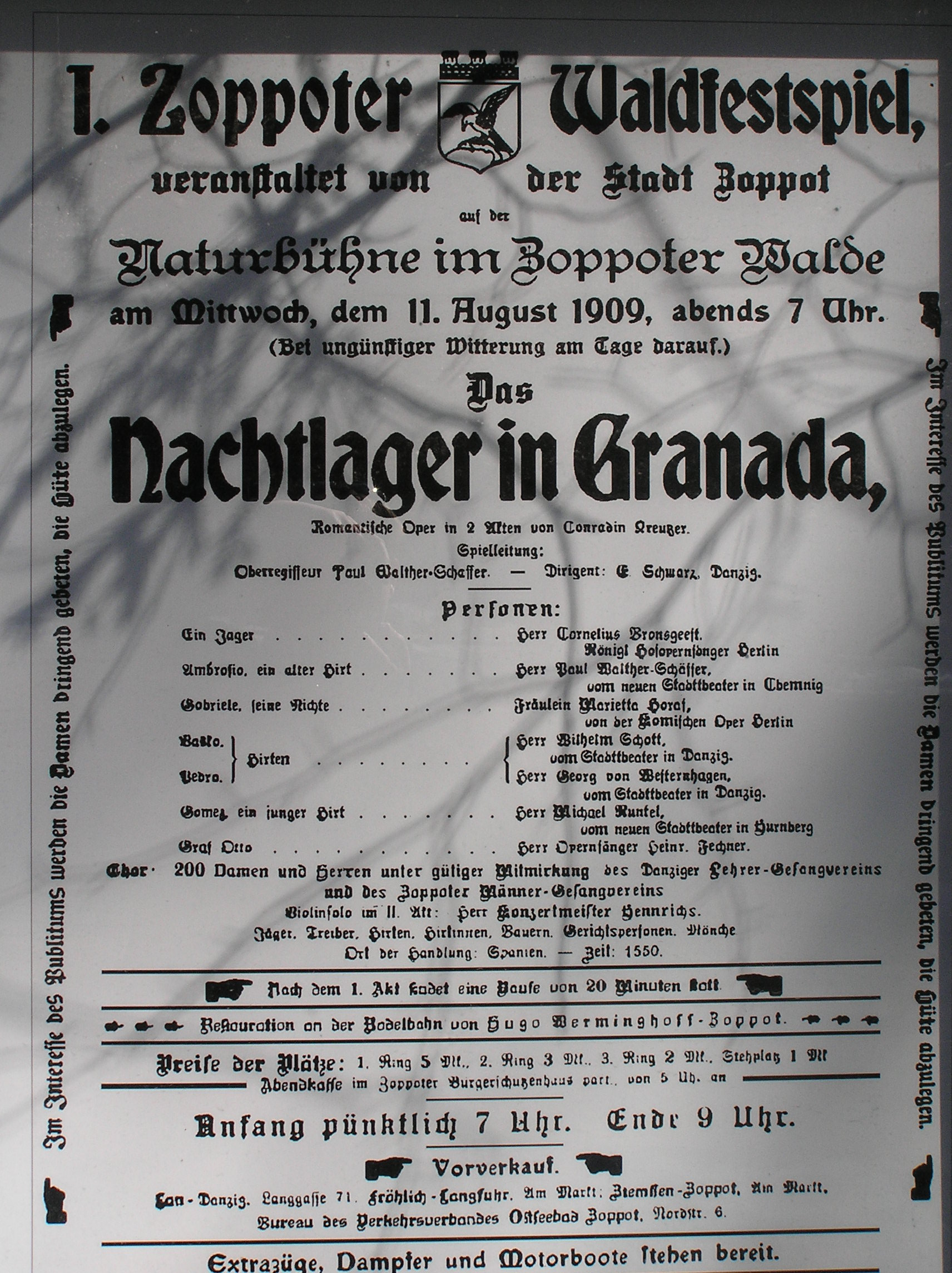 Plakat Erstes Zoppoter Waldfestspiel 1909 - Poster First Sopot Festival 1909